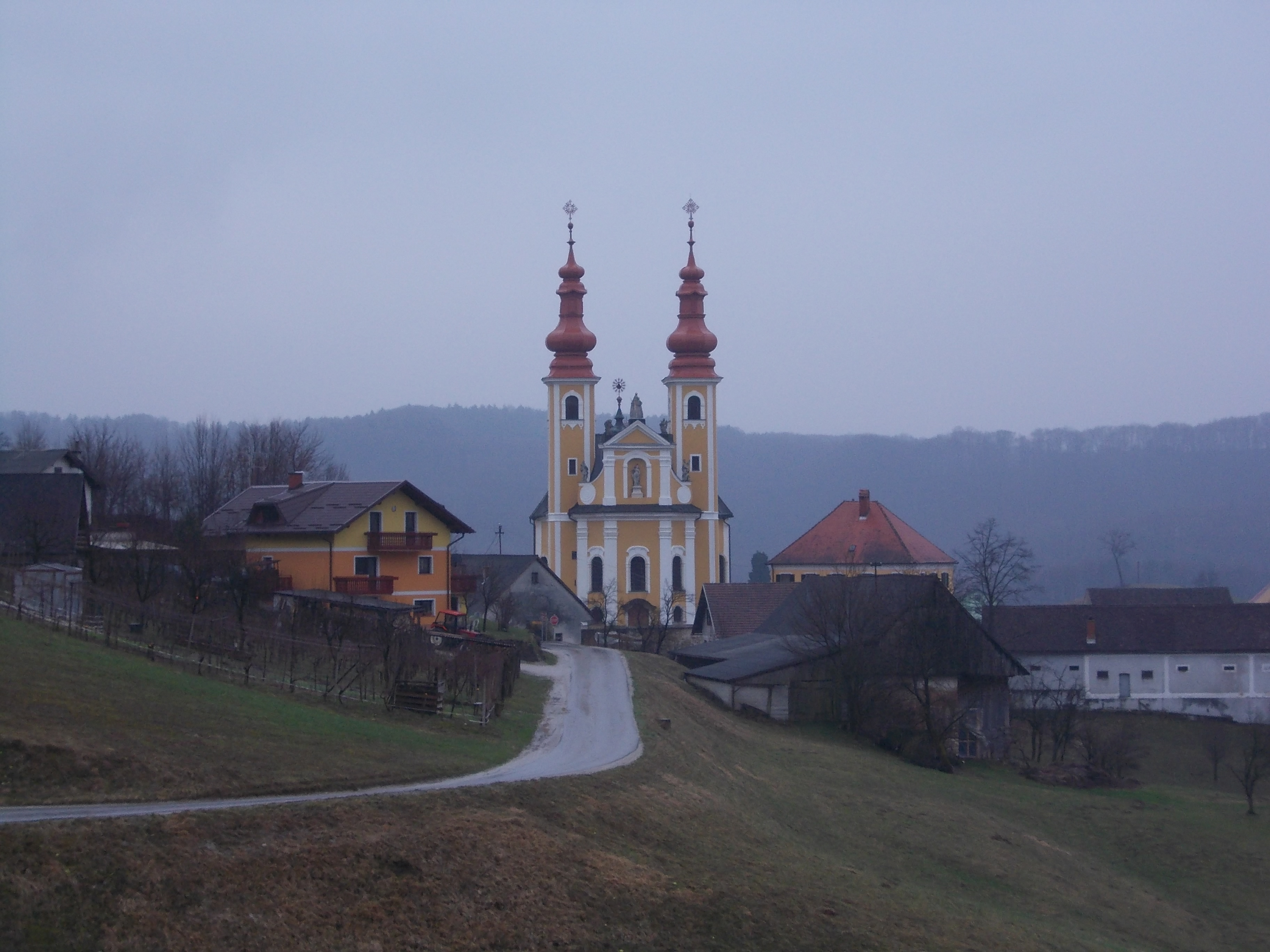 Marian shrine Sladka Gora